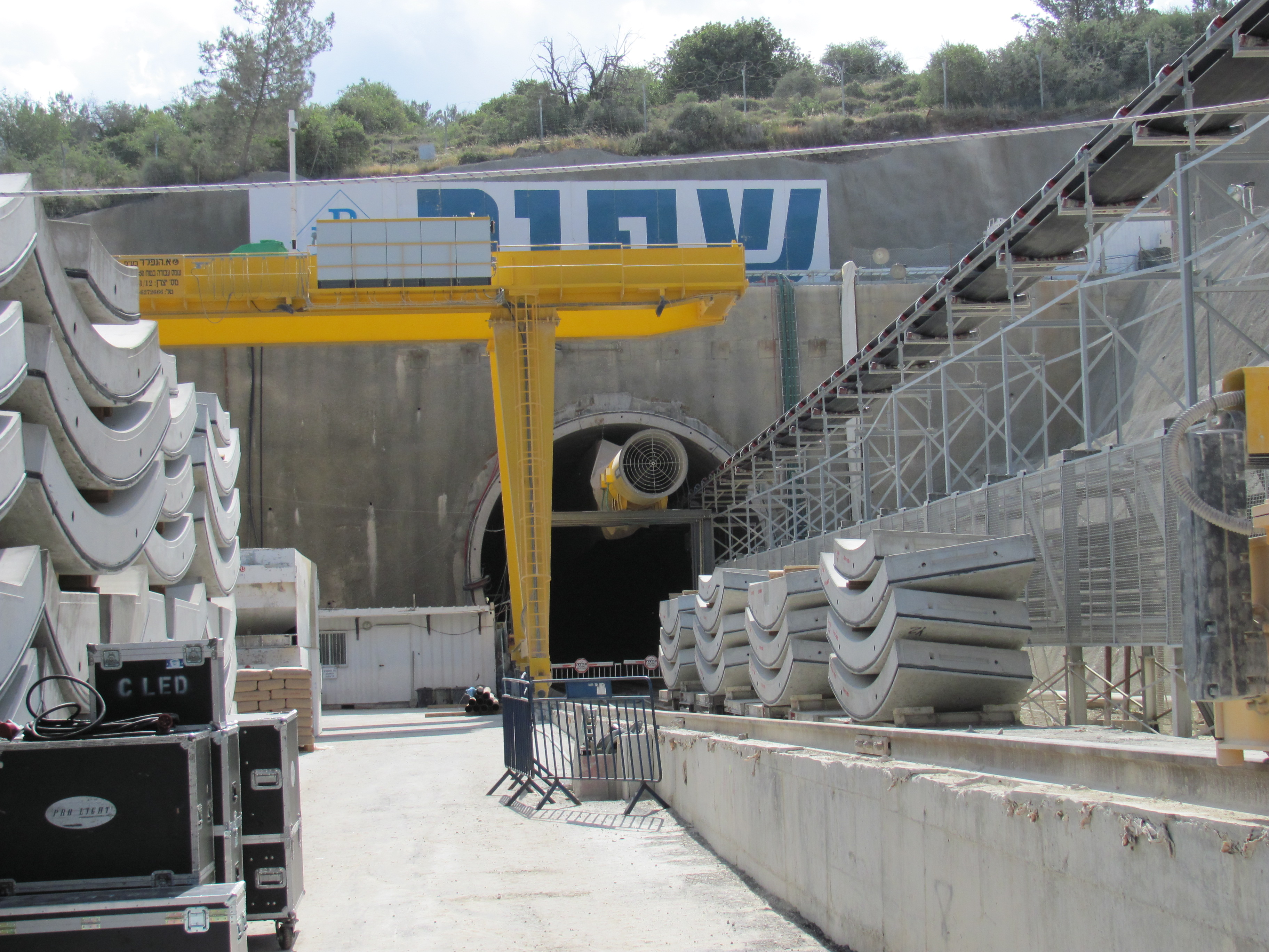 ו הרכבת המהיר לירושלים מנהרה 3 הדרומית, יציאה מערבית